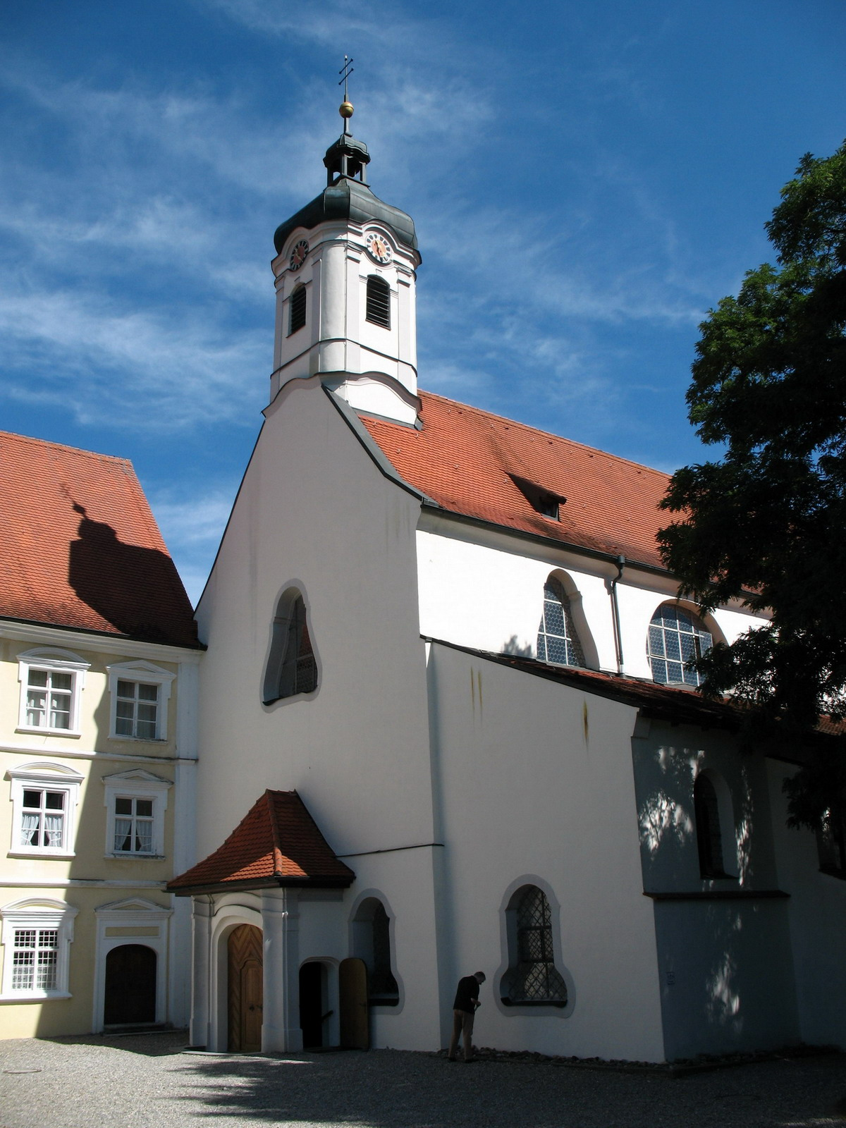 Die Pfarrkirche St. Kosmas und Damian von Gutenzell. Sie ist teil einer ehemaligen Klosteranlage.